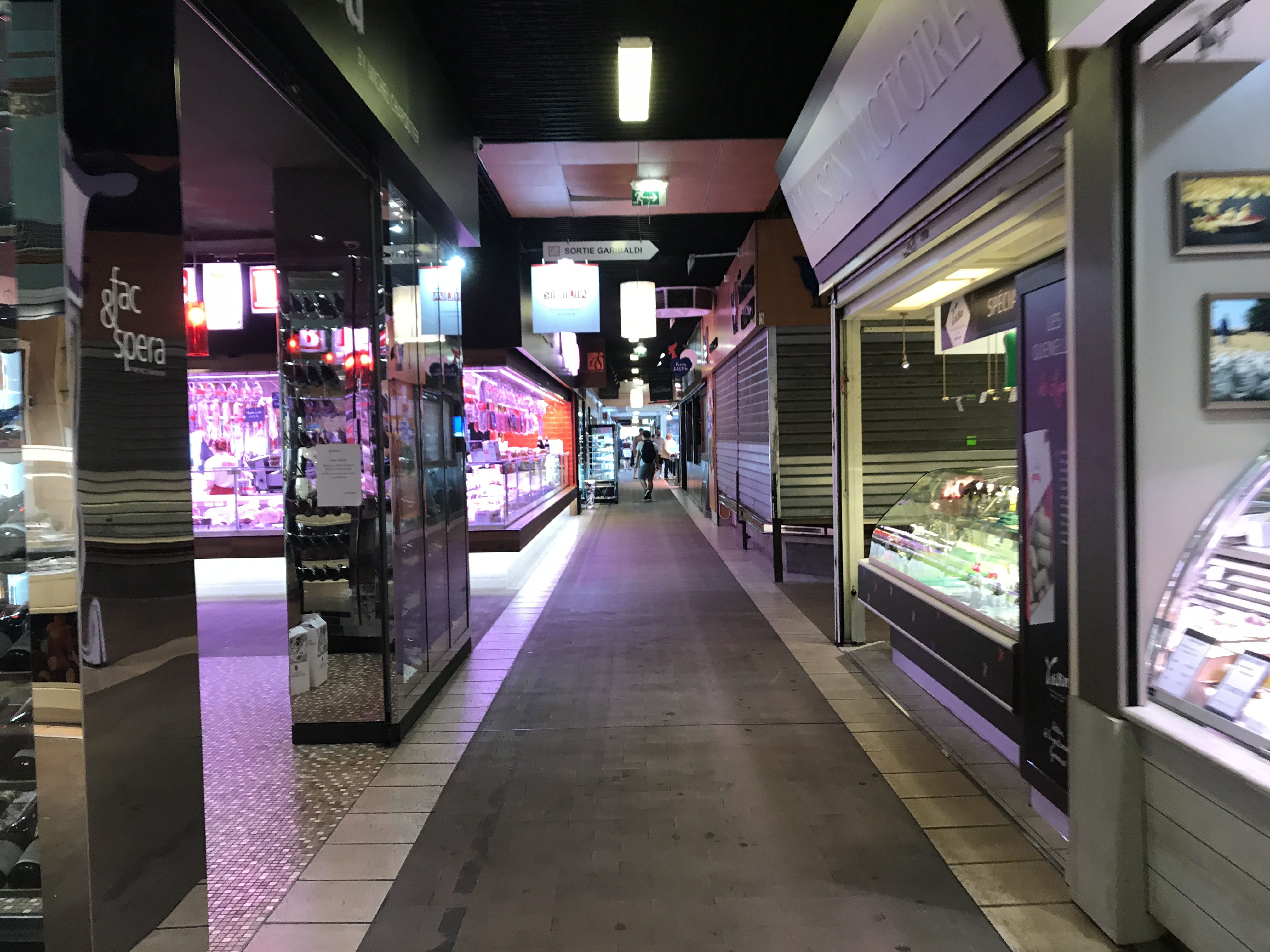 Halles de Lyon.